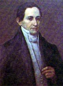 Oil painting of Domingo de Caycedo y Sanz de Santamaría, president of Colombia.